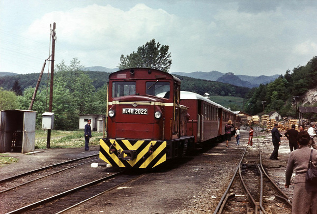 Az Mk48 2022 pályaszámú mozdony vonatával indulásra vár Füzérkomlóson.